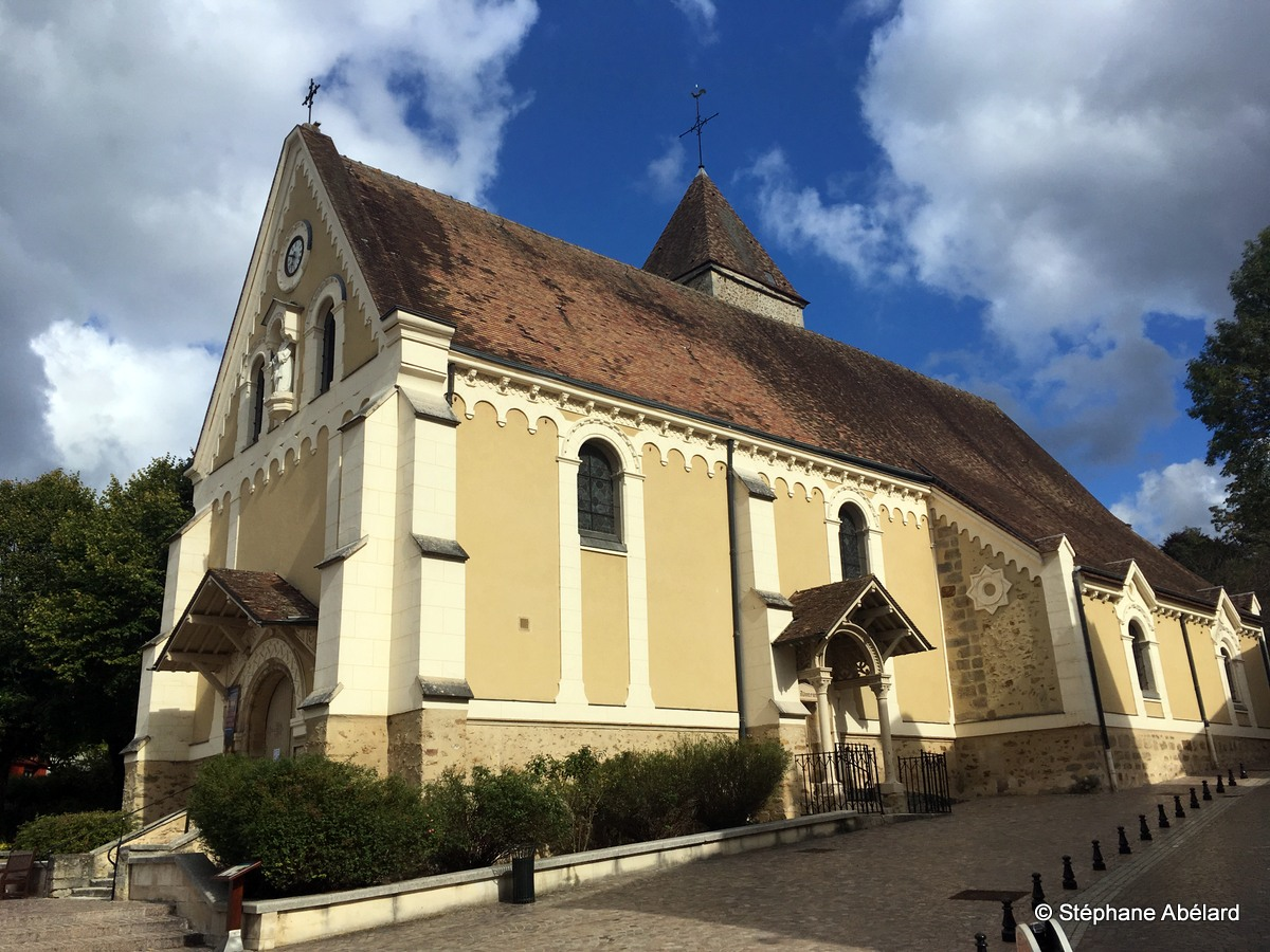 Yerres - L’église Saint-Honest est une église paroissiale de culte catholique, dédicacée au martyr Honest du IIIe siècle